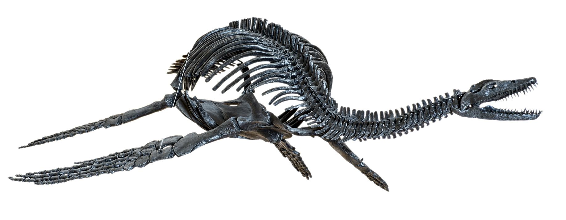 Plesiosauro. Replica.